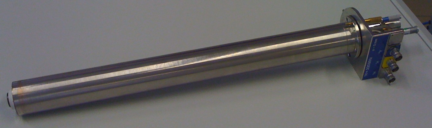 Photo d'une sonde DUAL 19F/1H 200 MHz Bruker